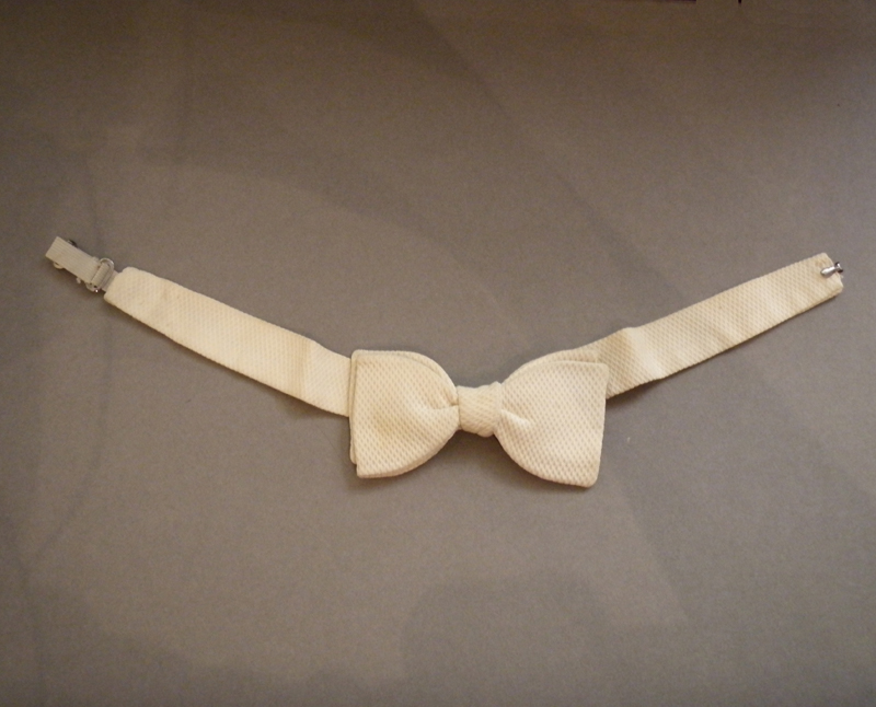 Παπιγιόν φράκου από λευκό πικέ ύφασμα.Αθήνα. Δεκαετία 19501990.6.724 / Συλλογή Πελοποννησιακού Λαογραφικού Ιδρύματος